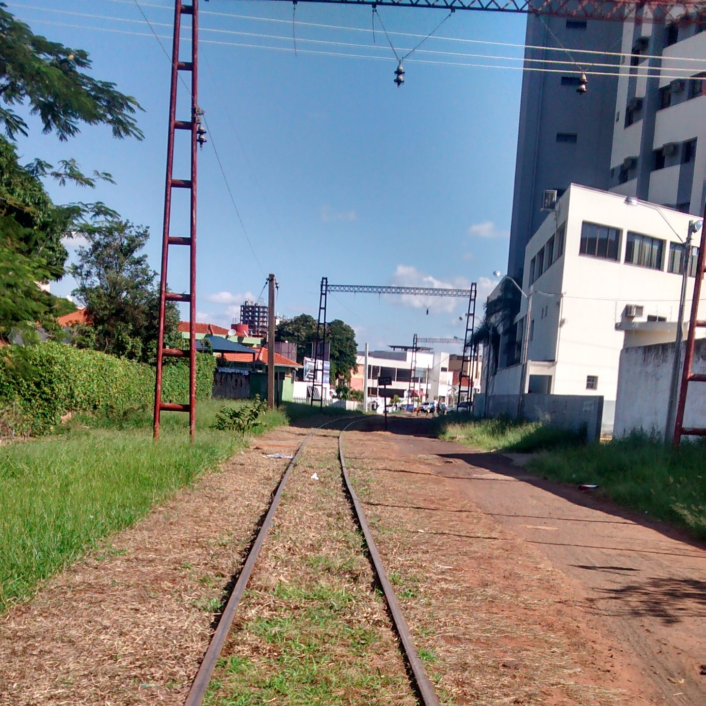 Trecho da Linha Férrea de Assis